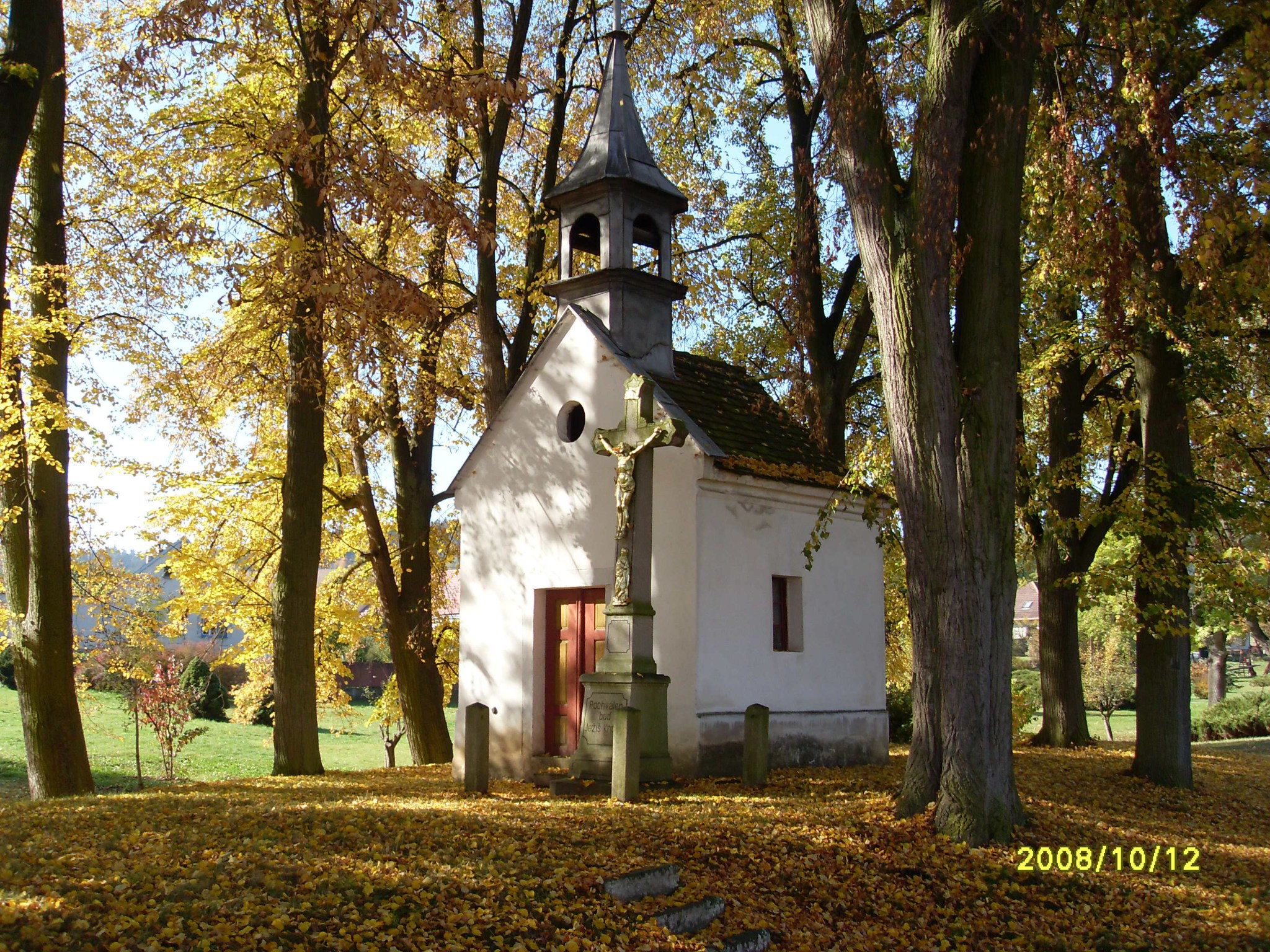 Kaplička v Mutné